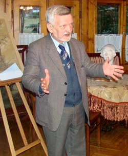 dr Andrzej B. Krupiński